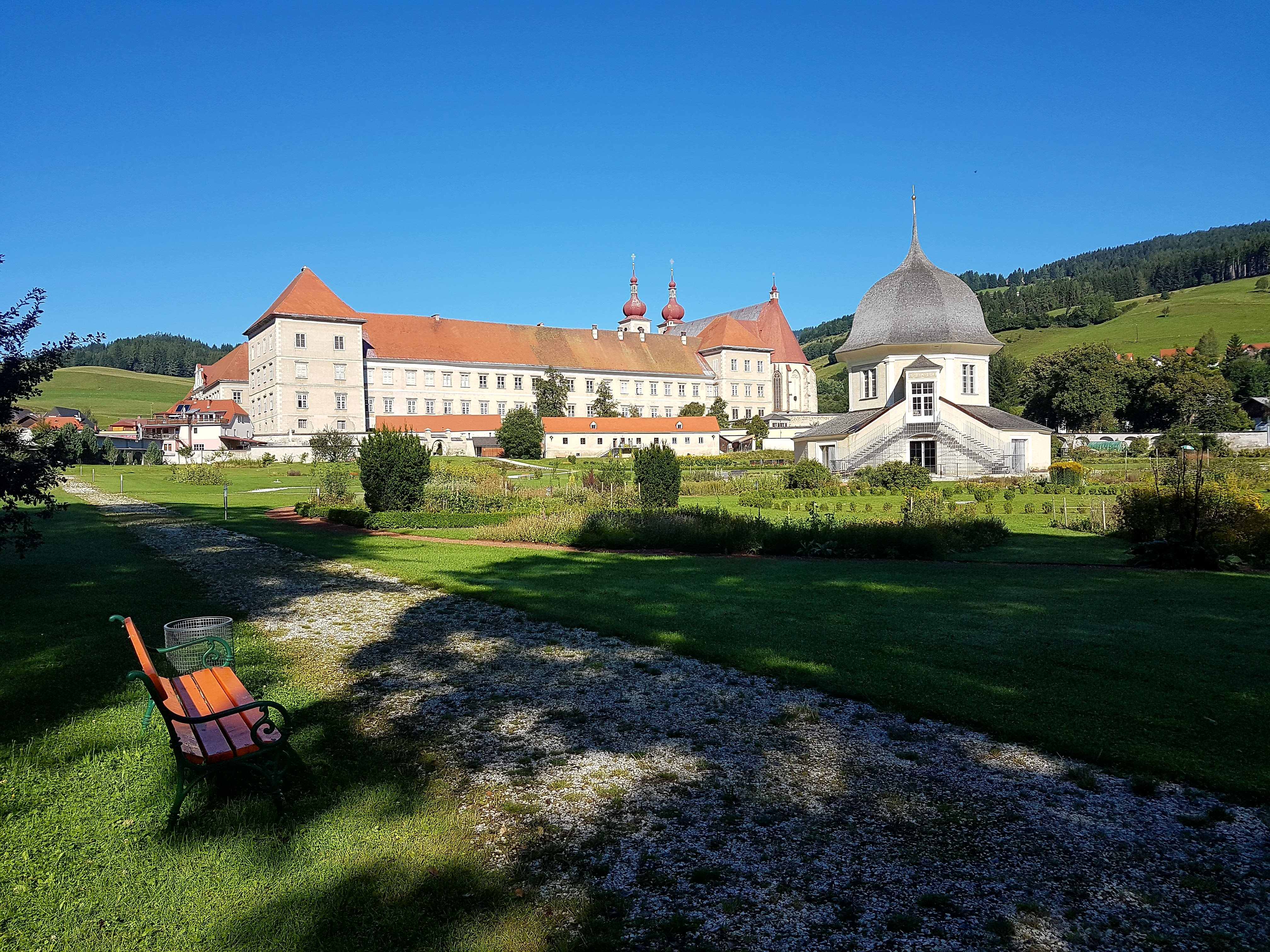 Stift Sankt Lambrecht